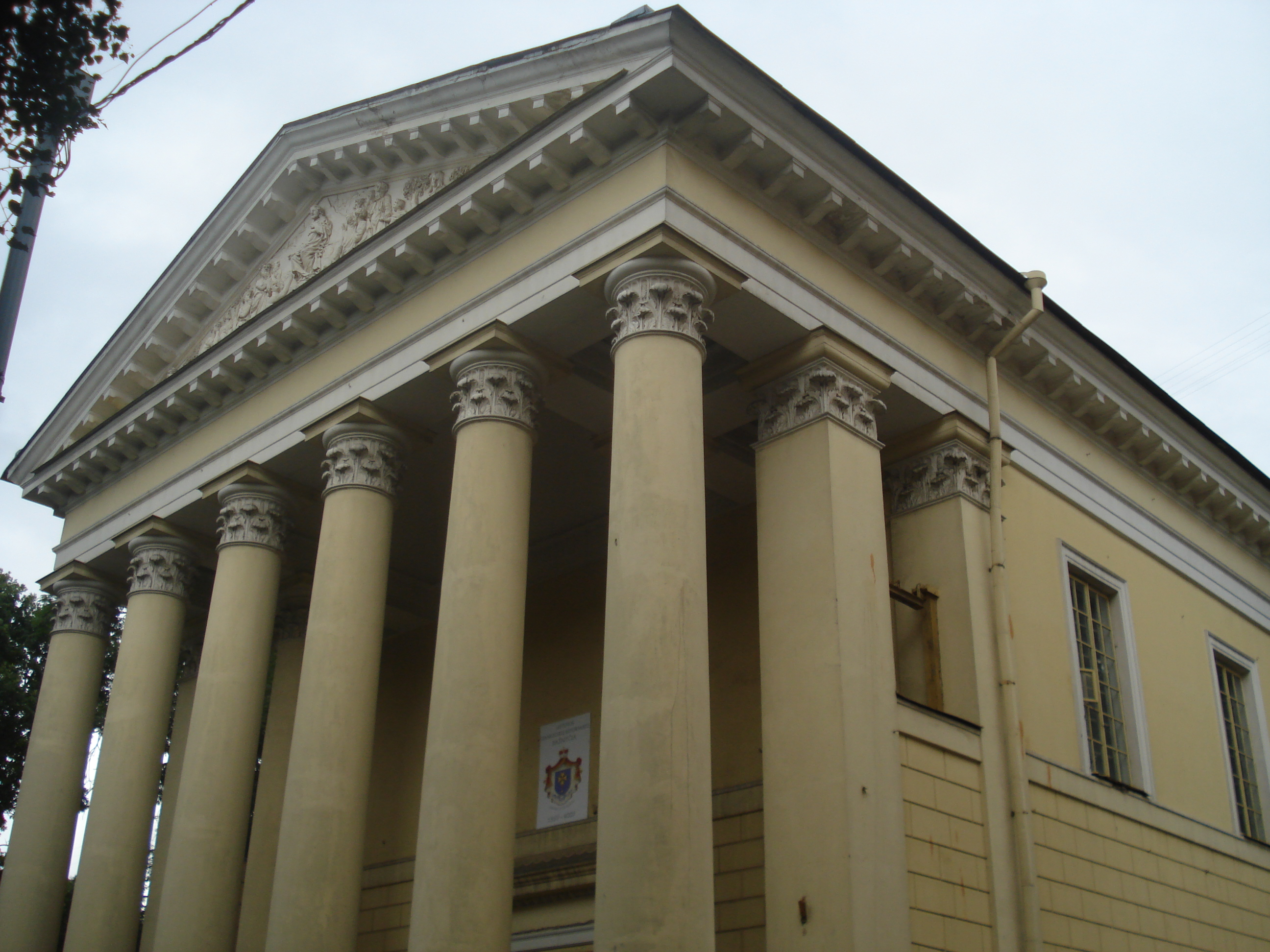 Evangelican Reformers' Church in Vilnius (Pylimo g., Karol Podczaszyński, 1829-1835)